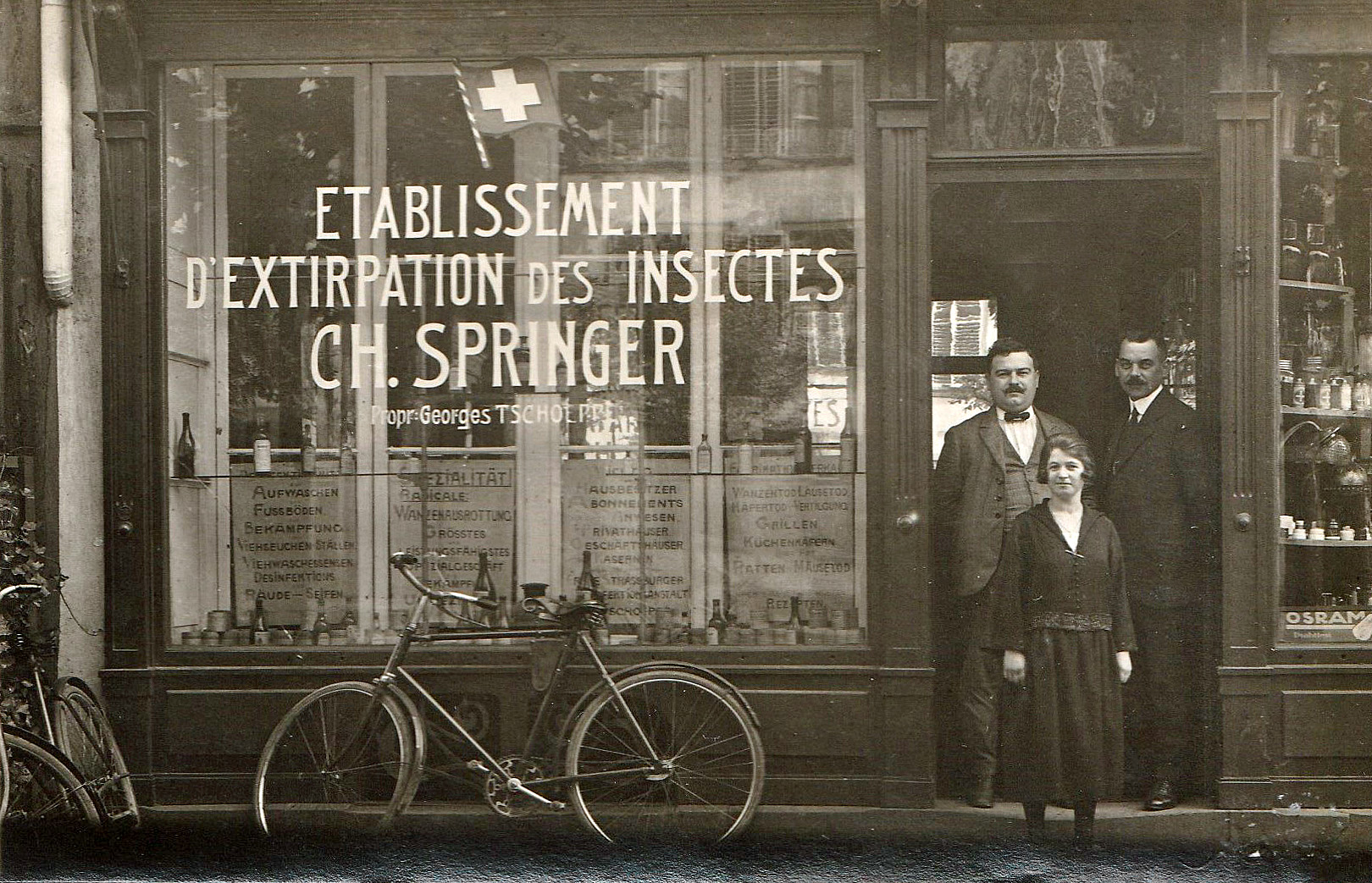 Strasbourg : 38 rue du Faubourg-de-Saverne en 1920. Etablissement d'extirpation des insectes Ch. Springer. Propr. Georges Tschoeppé.